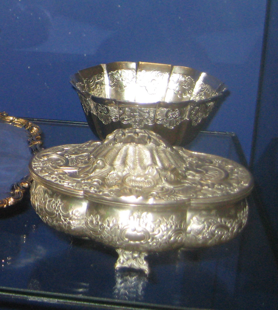 Полоскательница. Москва, 2-я пол. 18 века. Серебро, чеканка, канфарение. ГИМ Сахарница. МОсква, 1762. Серебро, литье, чеканка. ГИМ